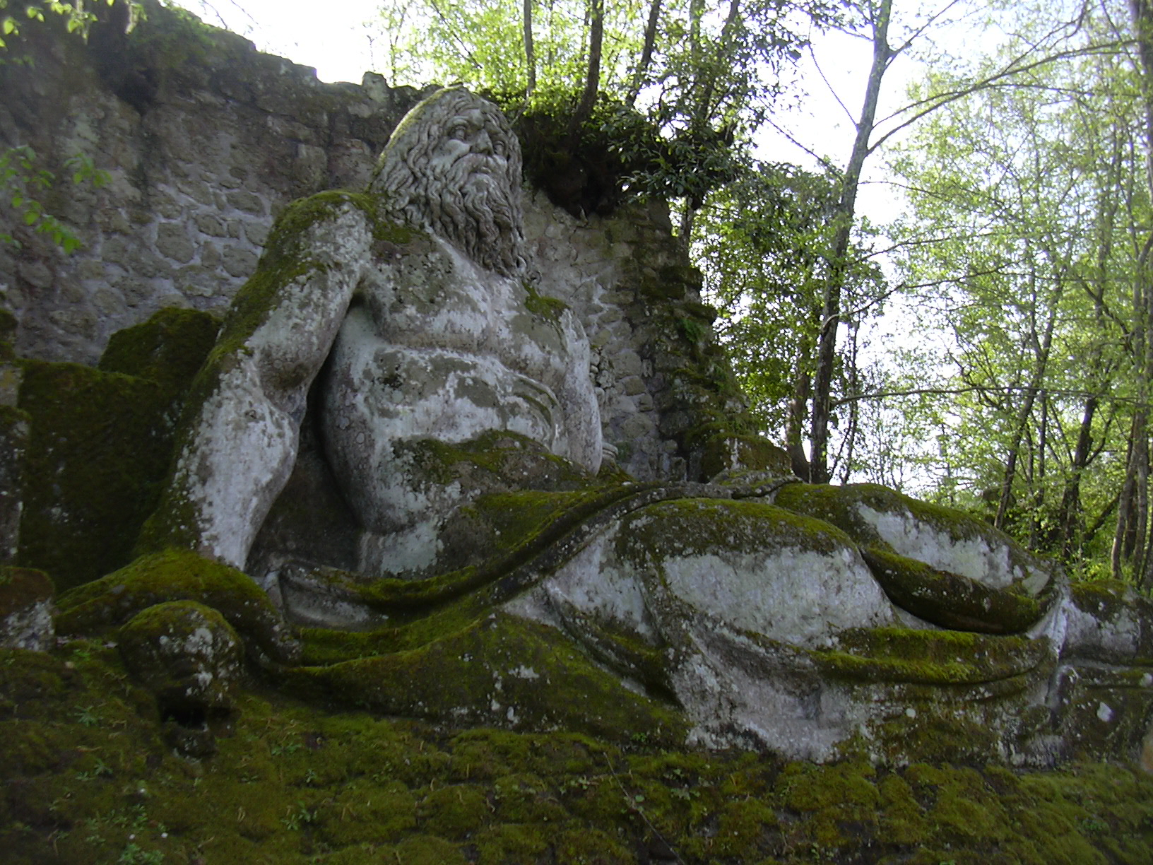 Sacro Bosco of Bomarzo, Neptune or Pluto